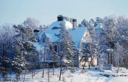 Klas Fåhraeus villa från 1898 (även kallad "Gröna udden") i Saltsjöbaden, arkitekt Gustaf Wickman (numera riven)